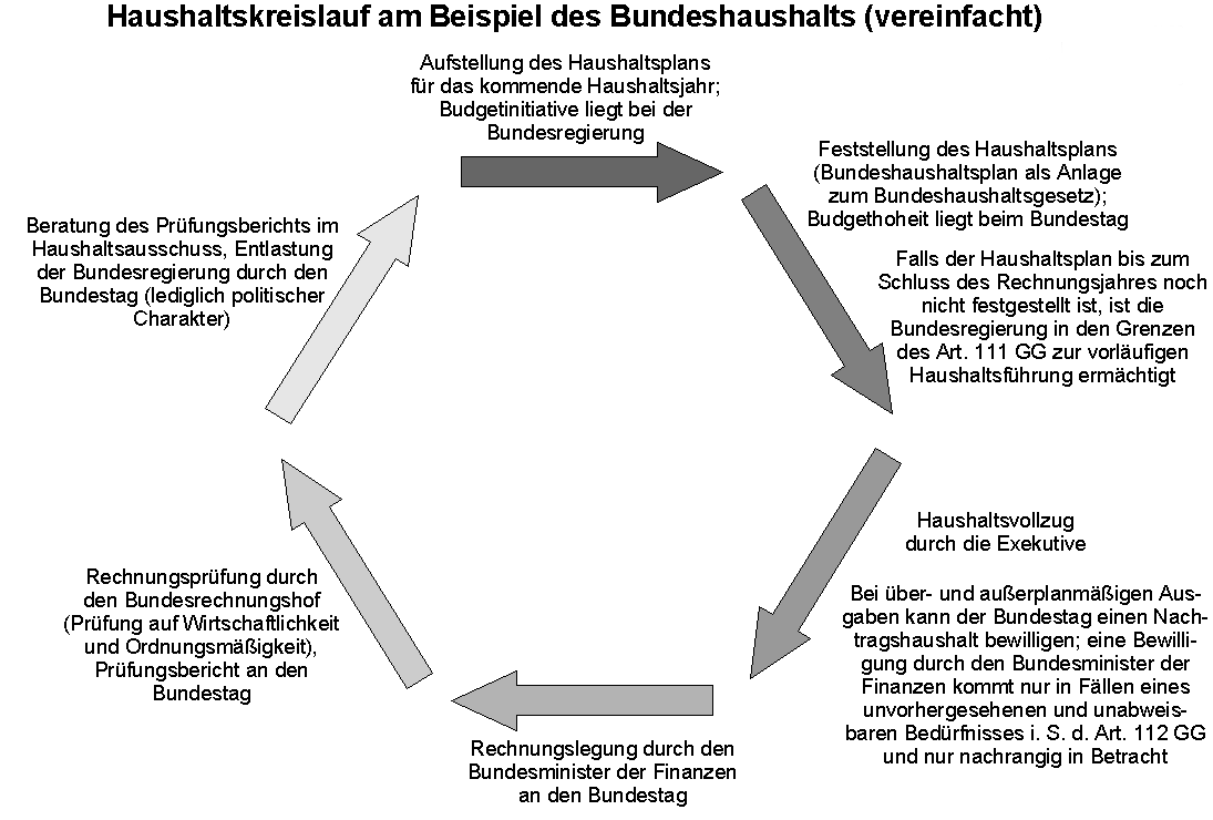 Haushaltskreislauf am Beispiel des Bundeshaushalts Autor: C.Löser Erstellt mit: de: Draw